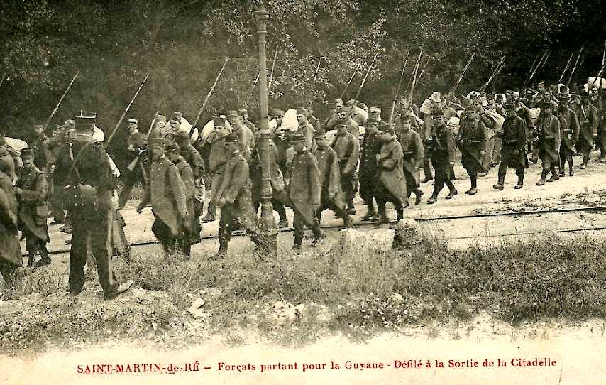 Detentos atravessam a pé o forte penal San Martín na Ilha de Ré escoltados por soldados. Imagem data de meados de 1887.